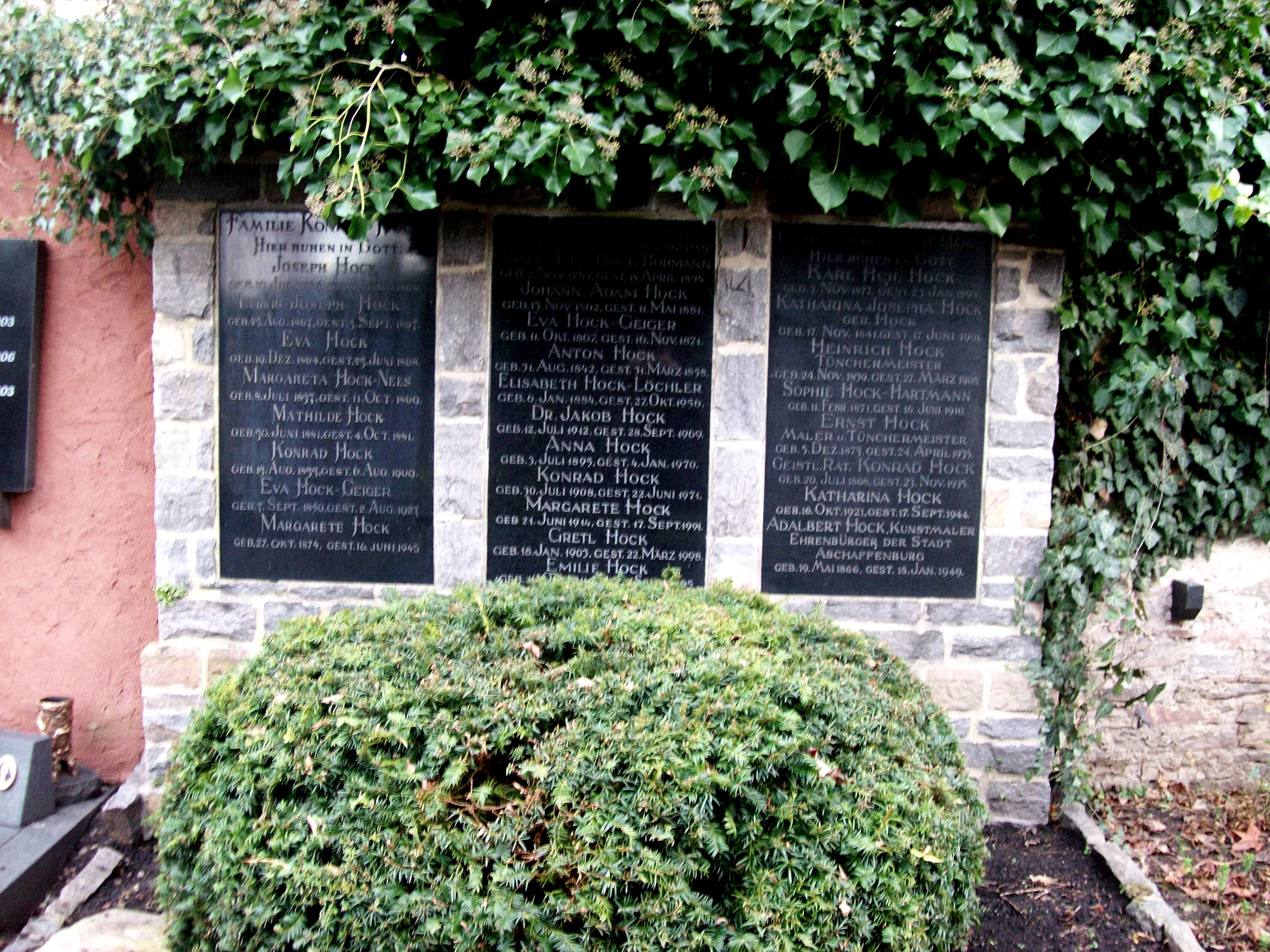 Grabstätte der Familie Hock - Adalbert Hock, Kunstmaler, Ehrenbürger der Stadt Aschaffenburg, geb. 19. Mai 1866, gest. 18. Jan. 1949